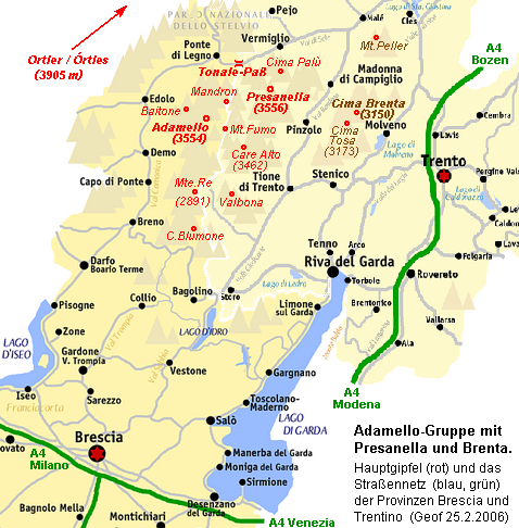 Hauptgipfel der Adamello-Presanella-Gruppe (rot) mit Brenta (braun).